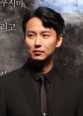 김남길(Kim Nam Gil) (영화 '판도라' 제작보고회)